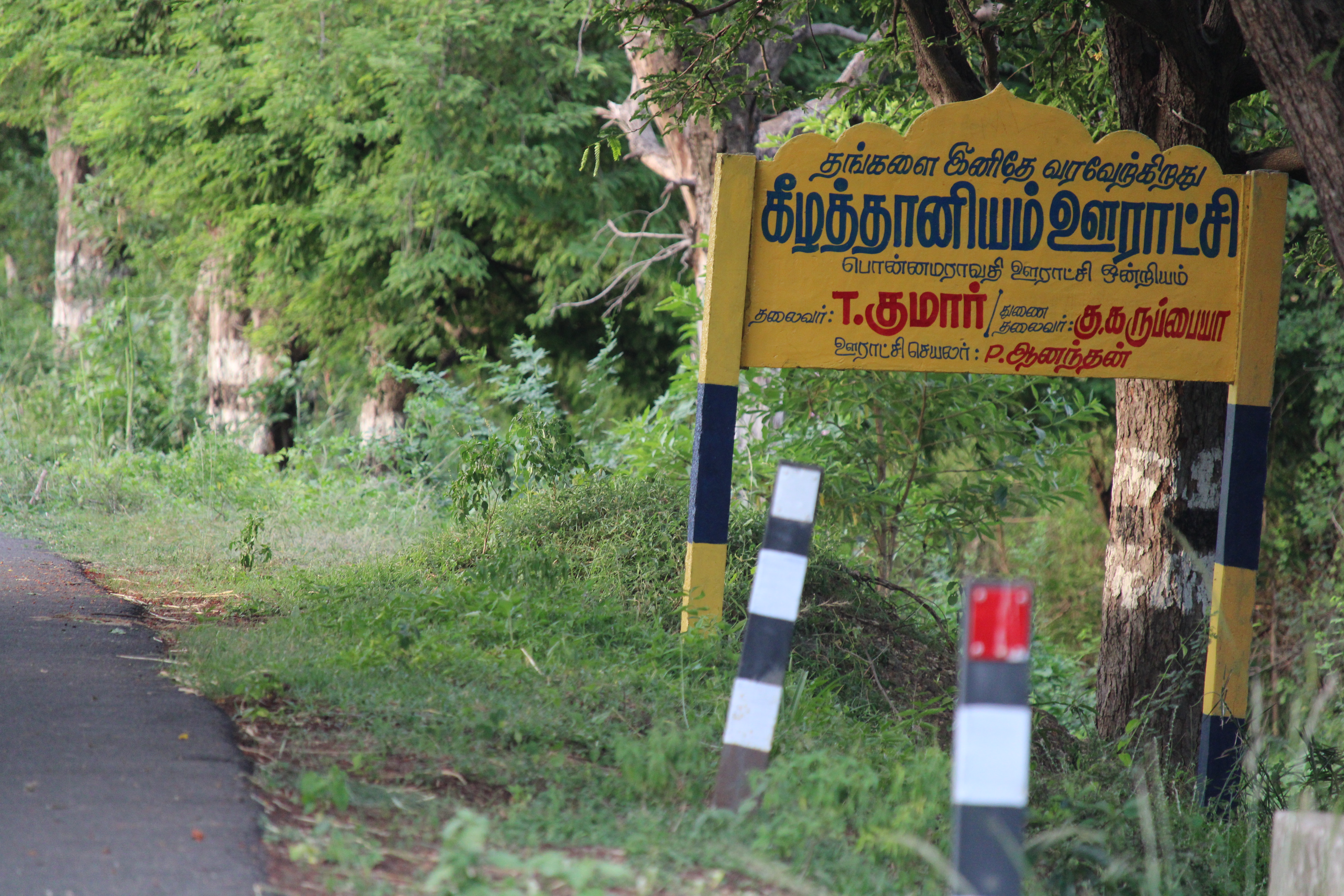 கீழத்தானியம் ஊராட்சி